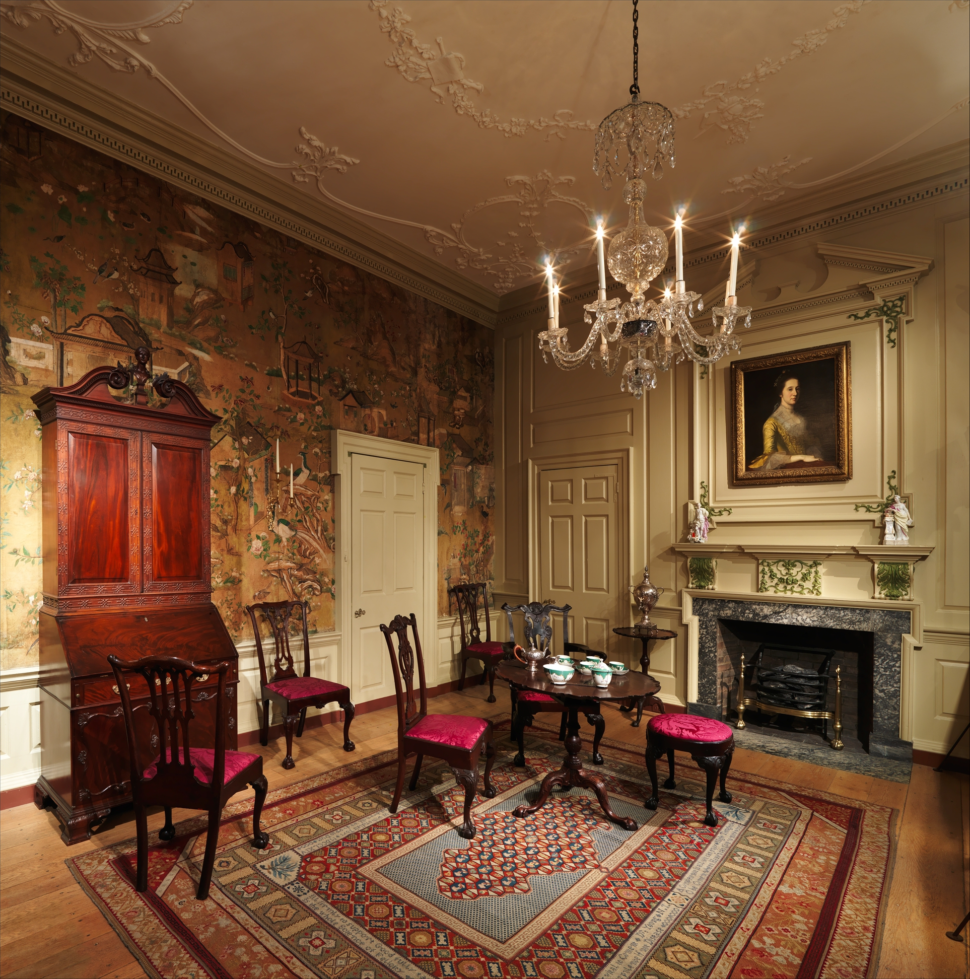 Irish; Chandelier; Glass